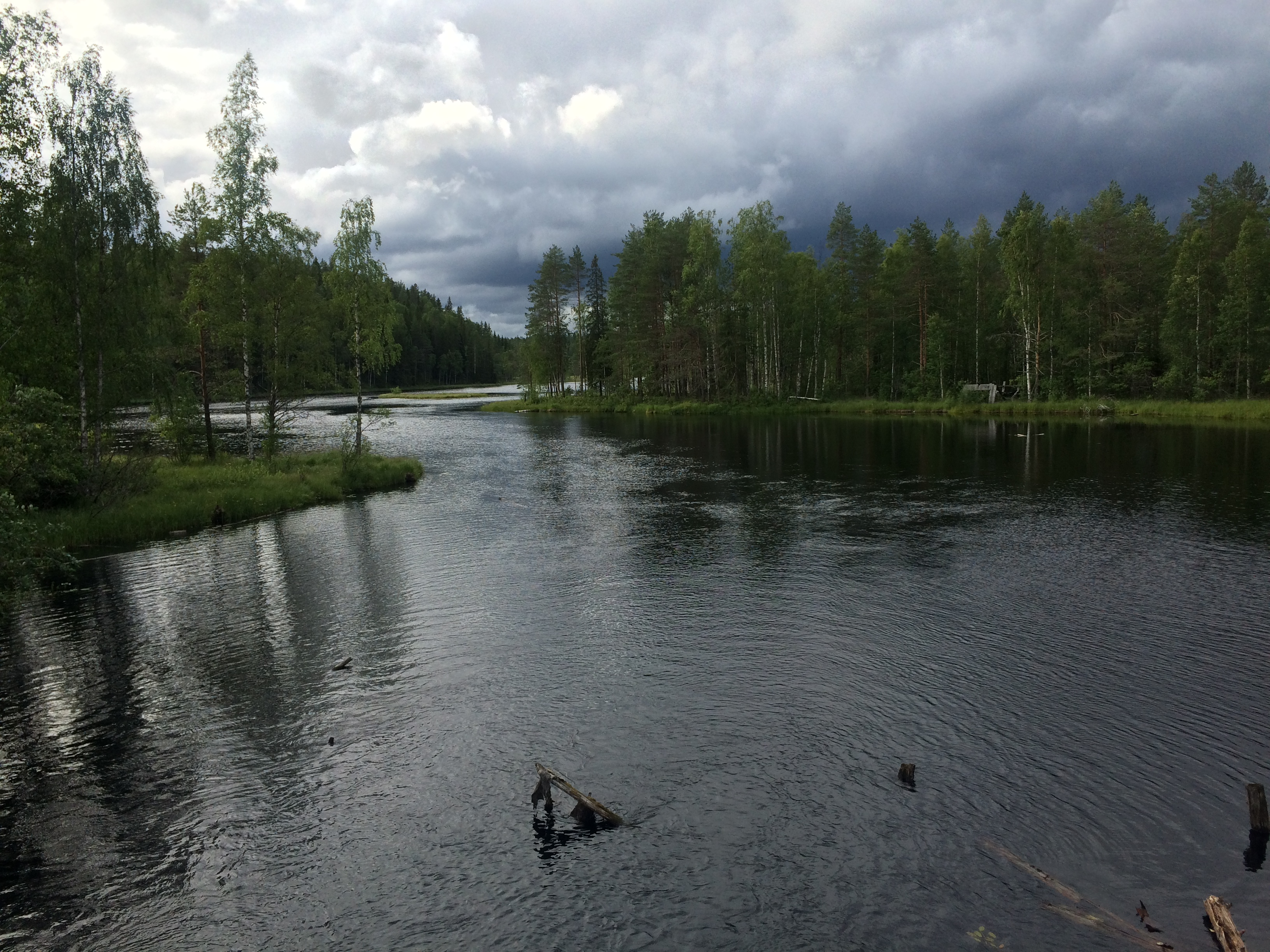 Сютивиермянйоки